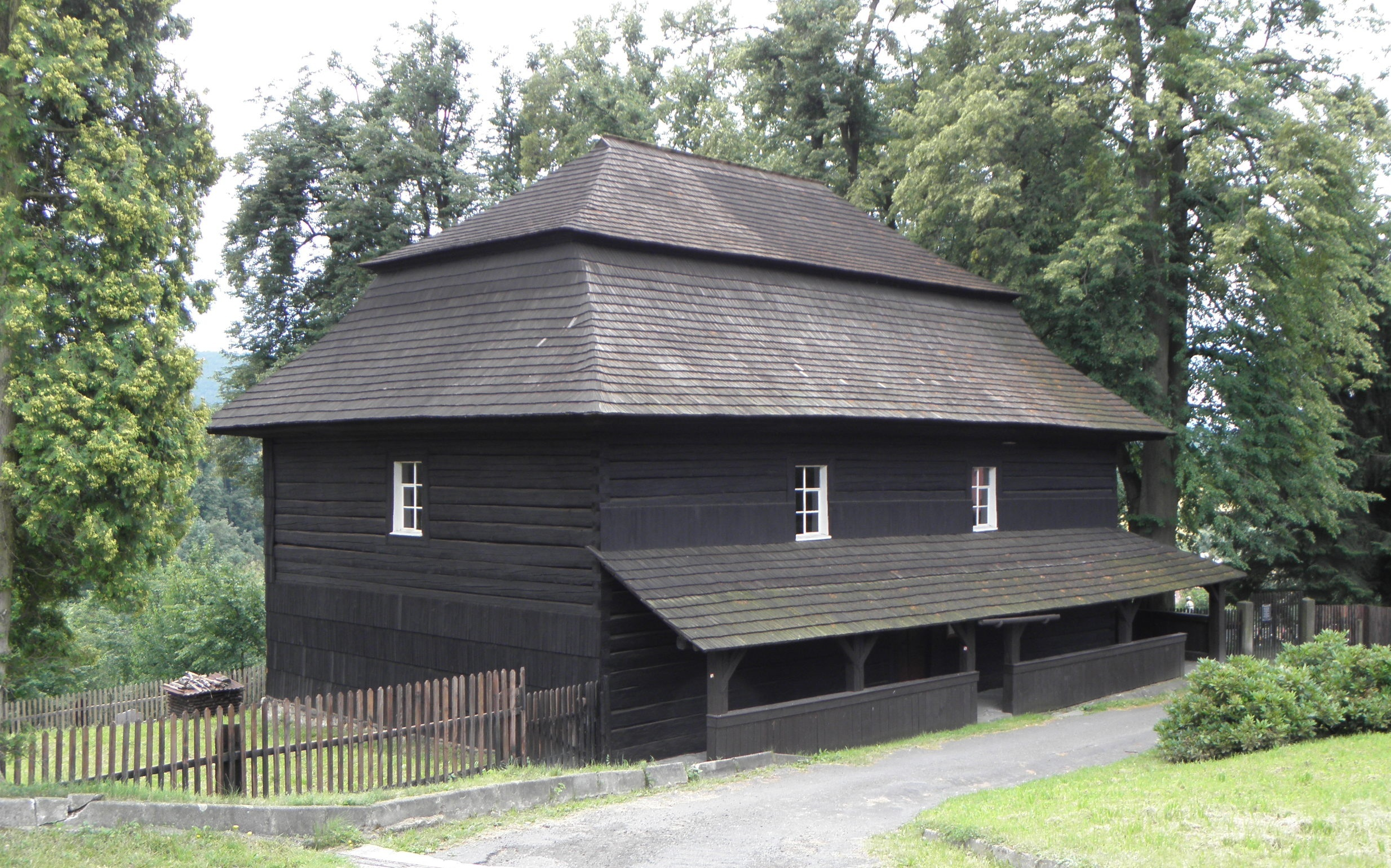 Toleranční kostel ve Velké Lhotě; Velká Lhota (CZ)